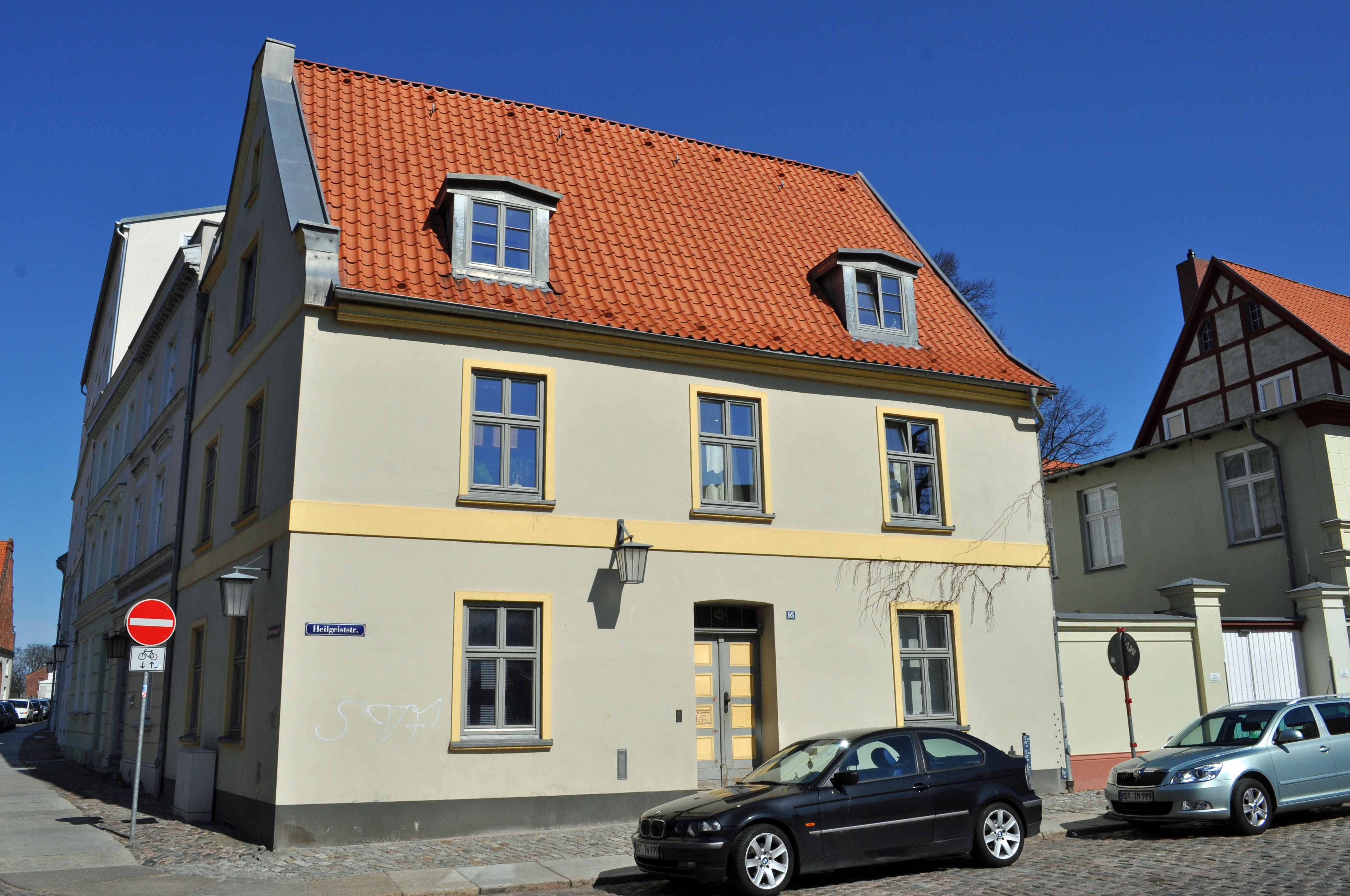 Gebäude bzw. Gebäudedetail in Stralsund. Straße und Hausnummer siehe Dateiname.